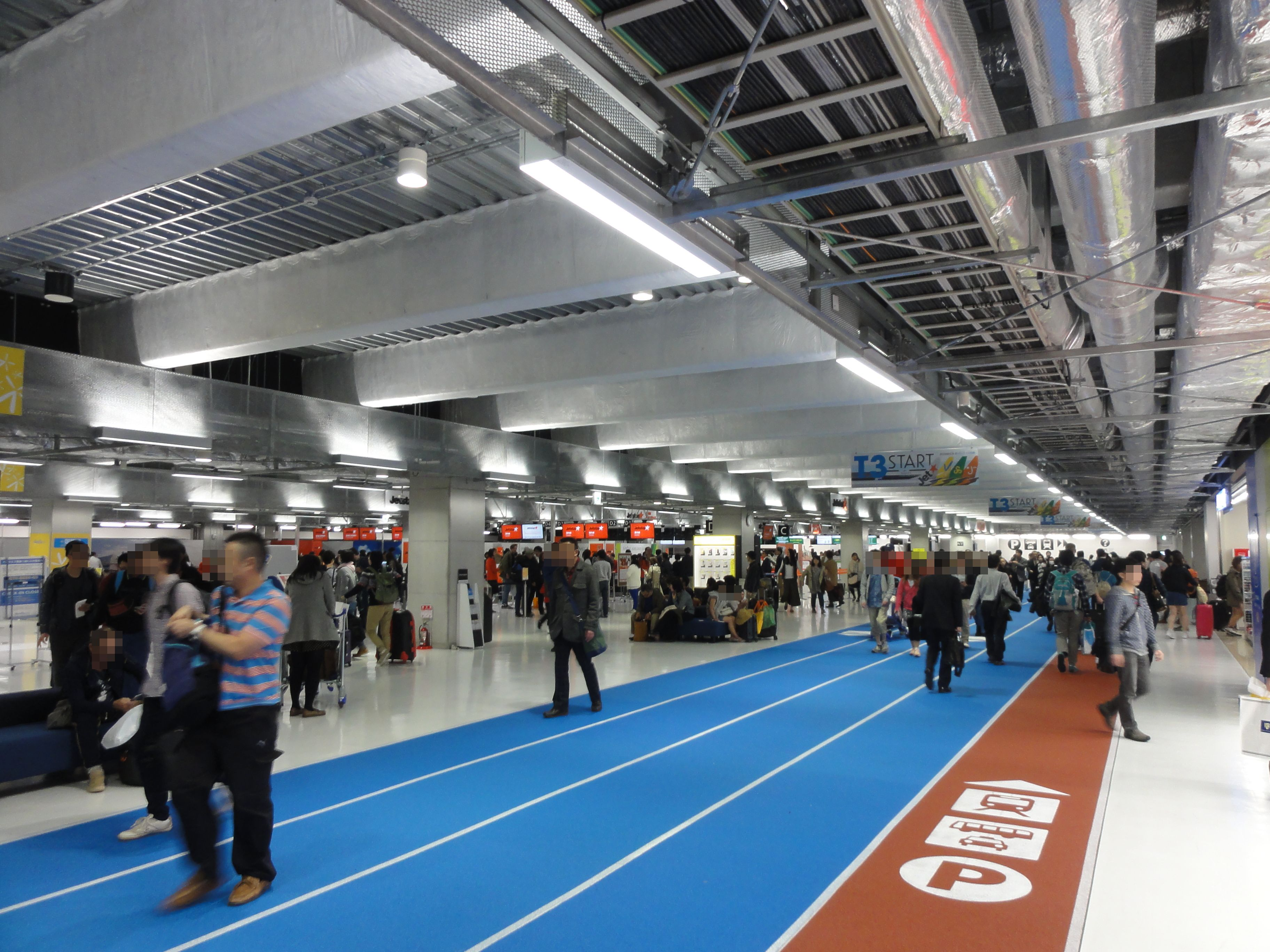 成田国際空港第3ターミナル 内部